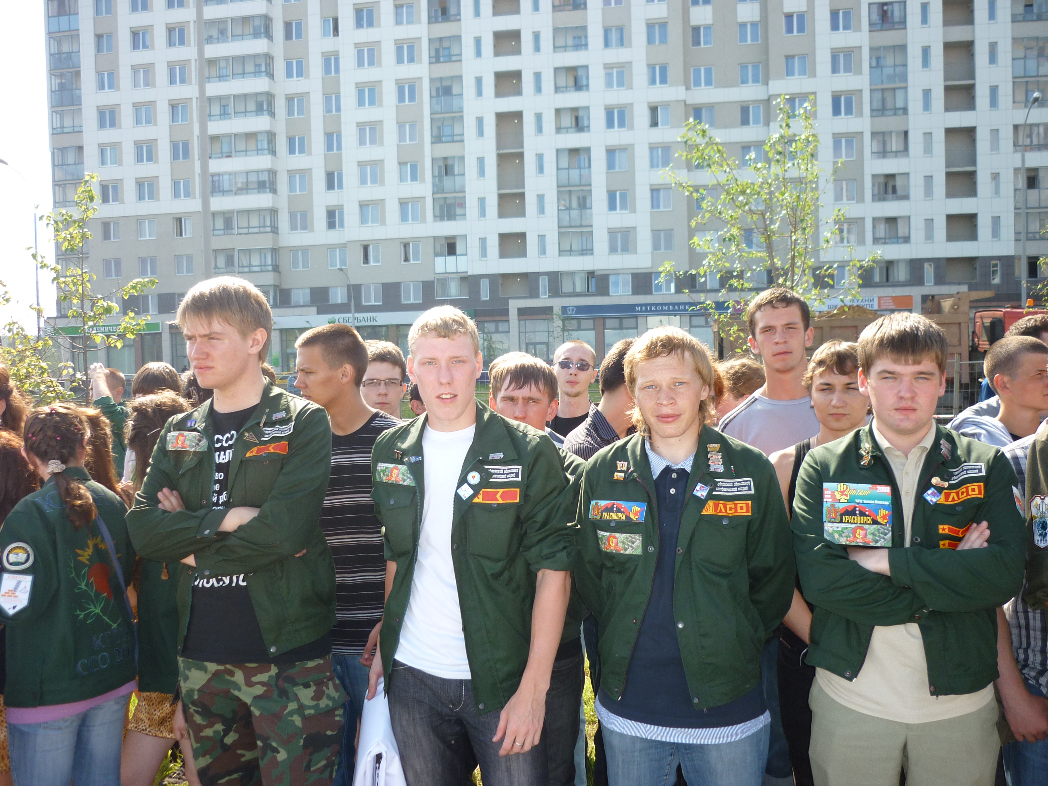 Бойцы ССО "Альтаир" на открытии Всероссийской студенческой стройки "Академический"